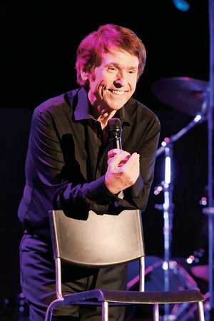 Raphael en su concierto.